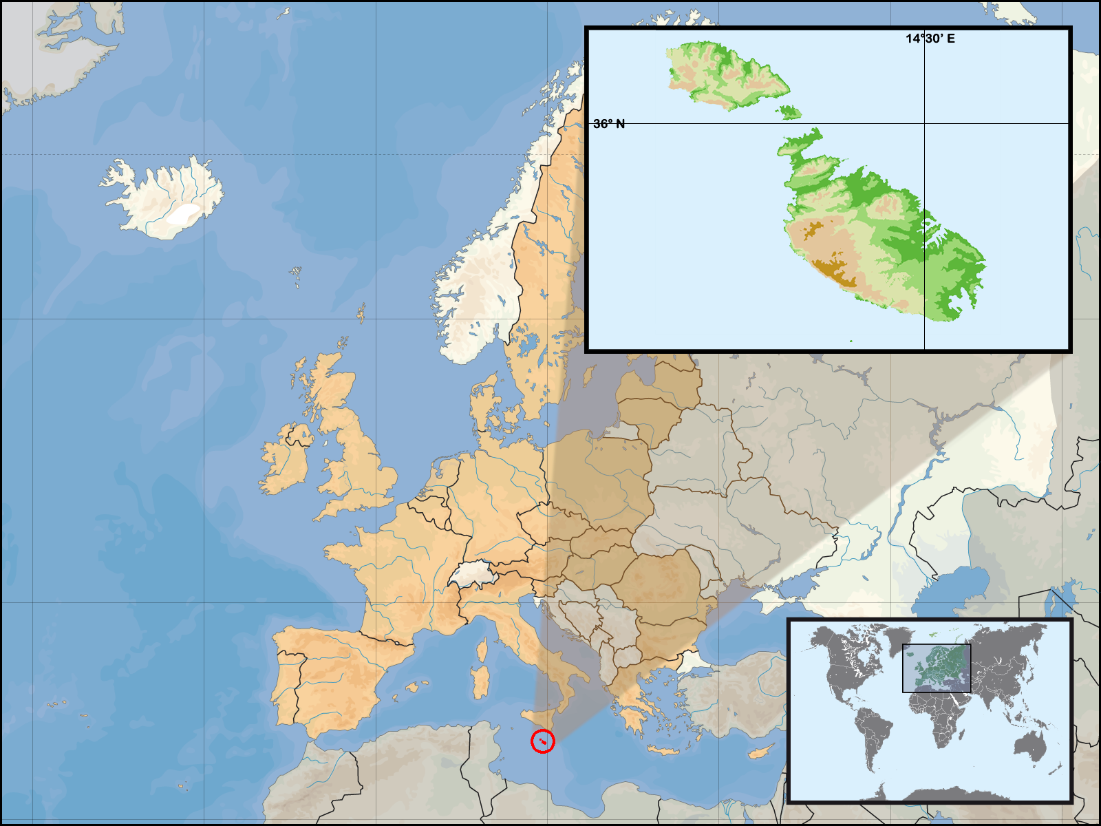 carte de localisation de Malte